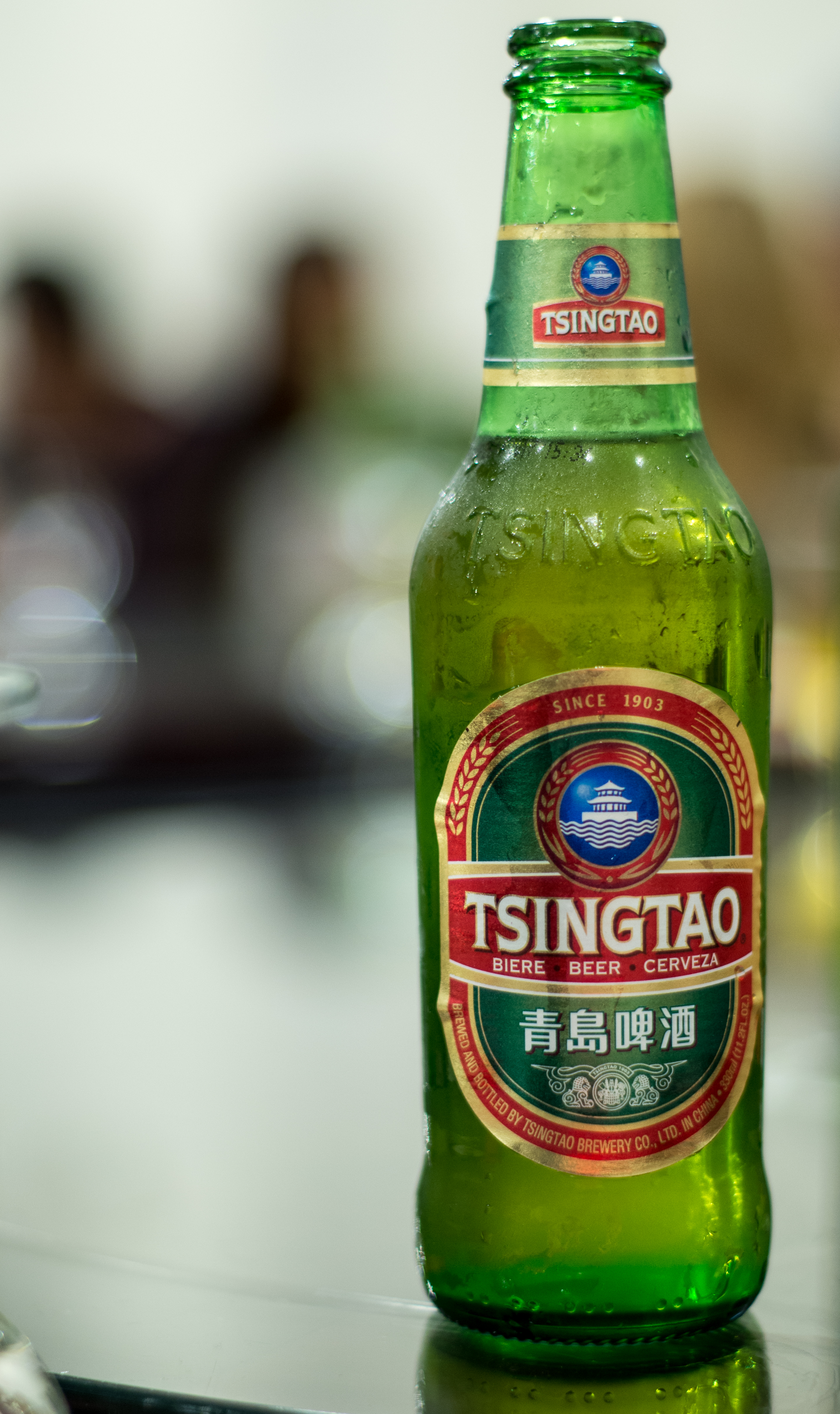 Cerveza China